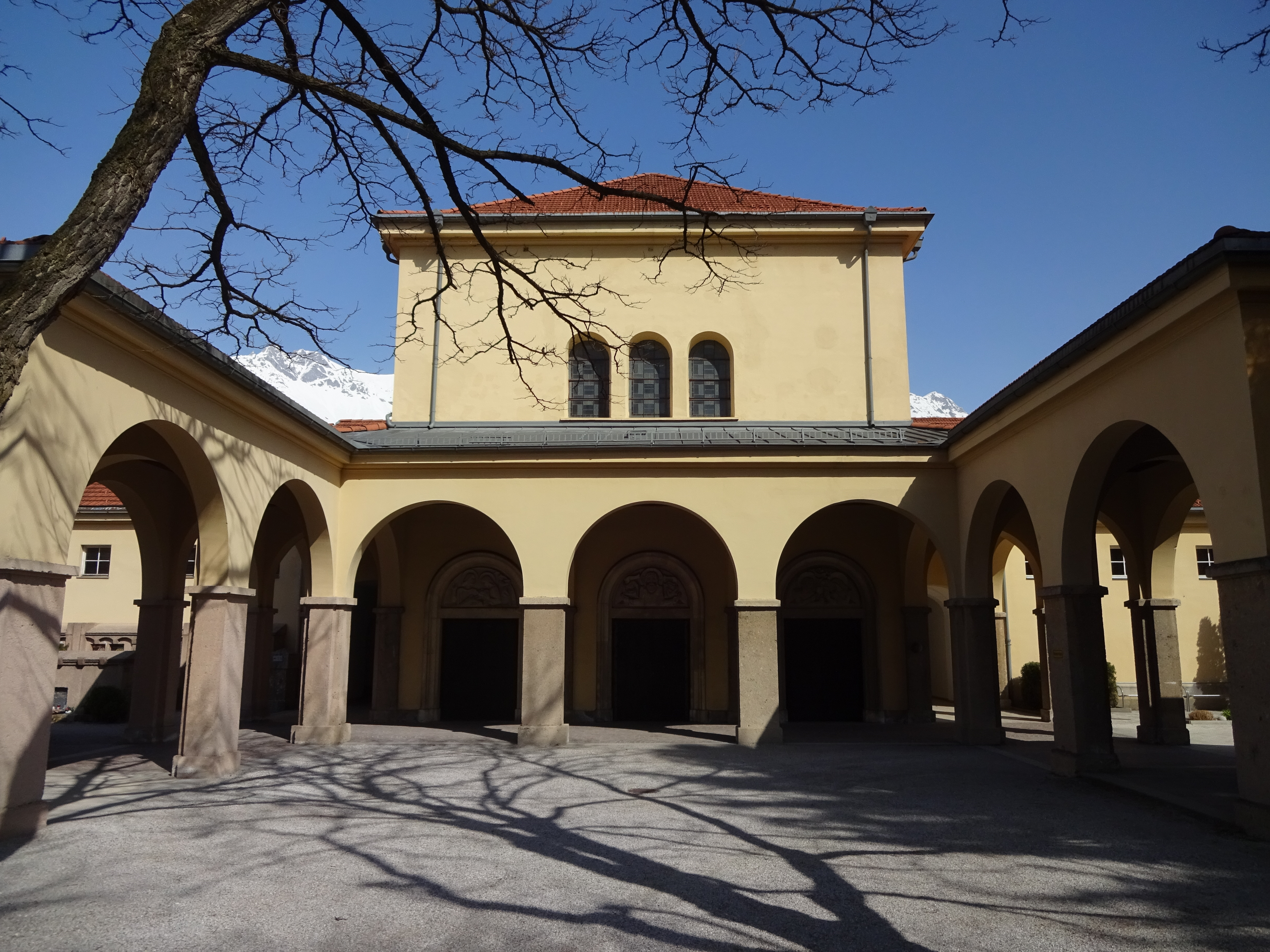 Westfriedhof Innsbruck, Kapelle von Süden This media shows the remarkable cultural object in the Austrian state of Tyrol listed by the Tyrolean Art Cadastre with the ID 68117. (on tirisMaps, on tirisdienste.at, pdf, more images on Commons)